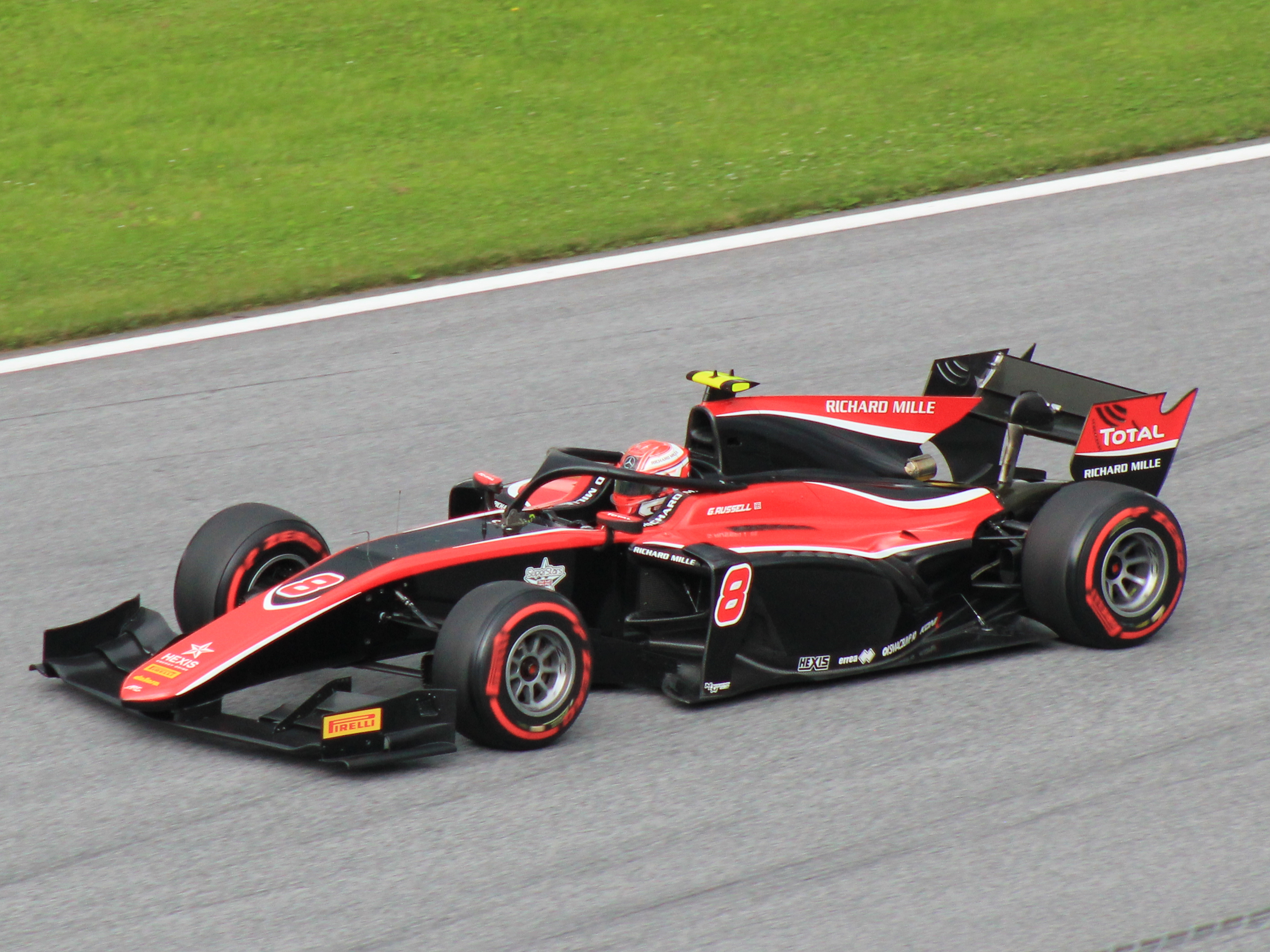 08 George Russell beim Rennwochenende in Österreich 2018 (4)